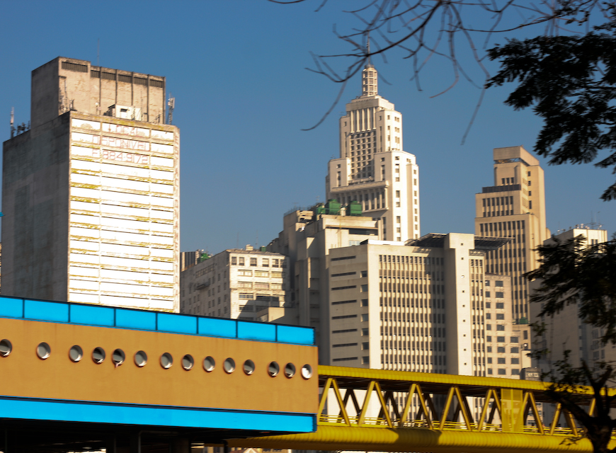 Centro da cidade de São Paulo.